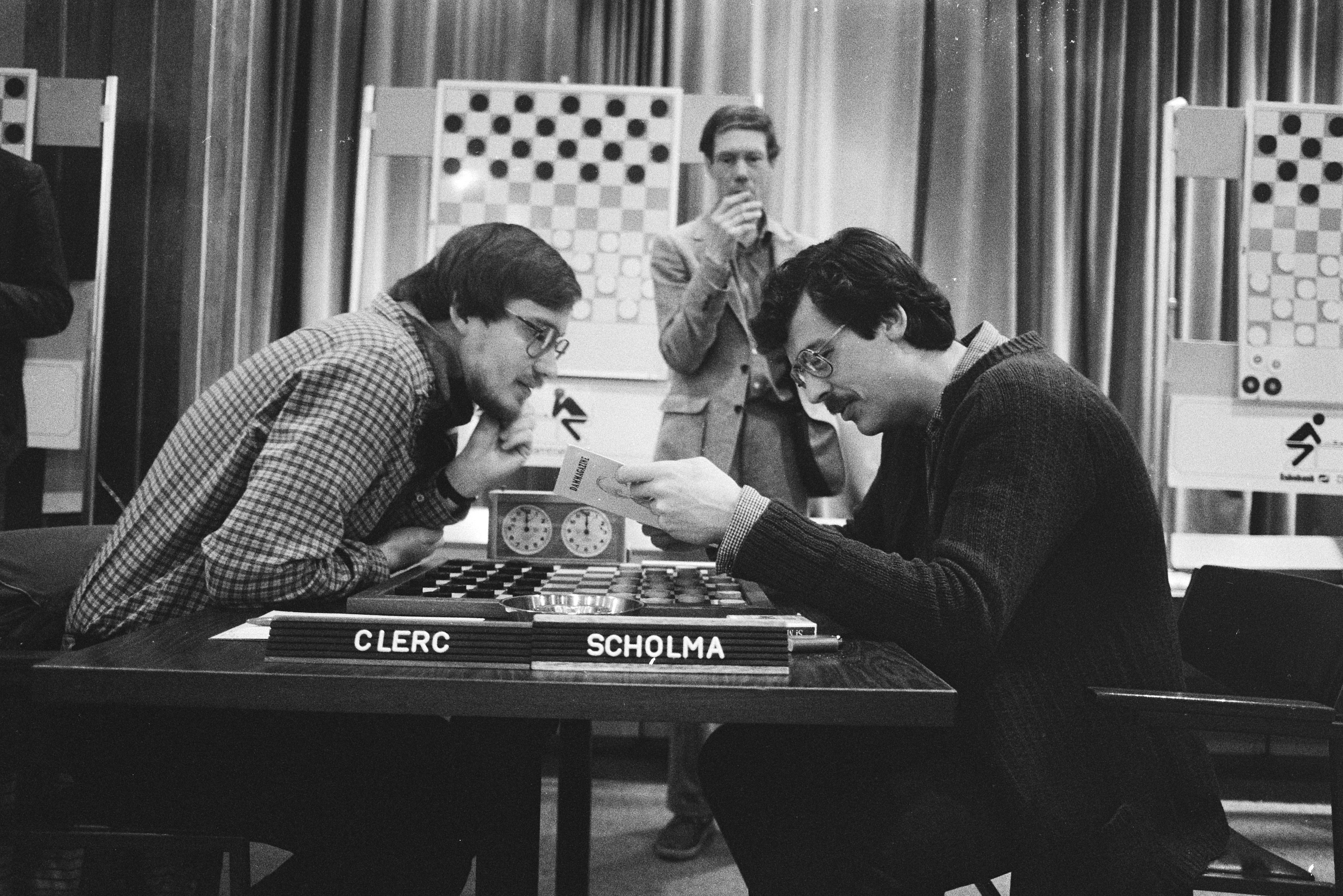 Rob Clerc (l) tegen Auke Scholma